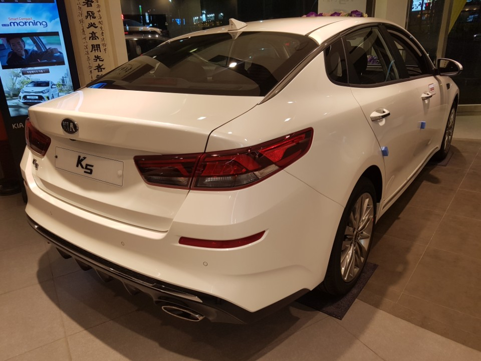 기아 더 뉴 K5(2세대) 후측면